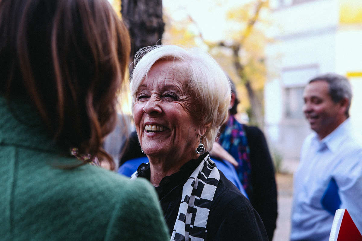 Michelle Bachelet sostiene almuerzo con un grupo de personalidades de la cultura. En la fotografia: Delfina Guzmán Correa (Santiago, 7 de abril de 1928) es una destacada primera actriz, guionista y directora teatral chilena. Actualmente es presidenta de Fundación Teatro a Mil.